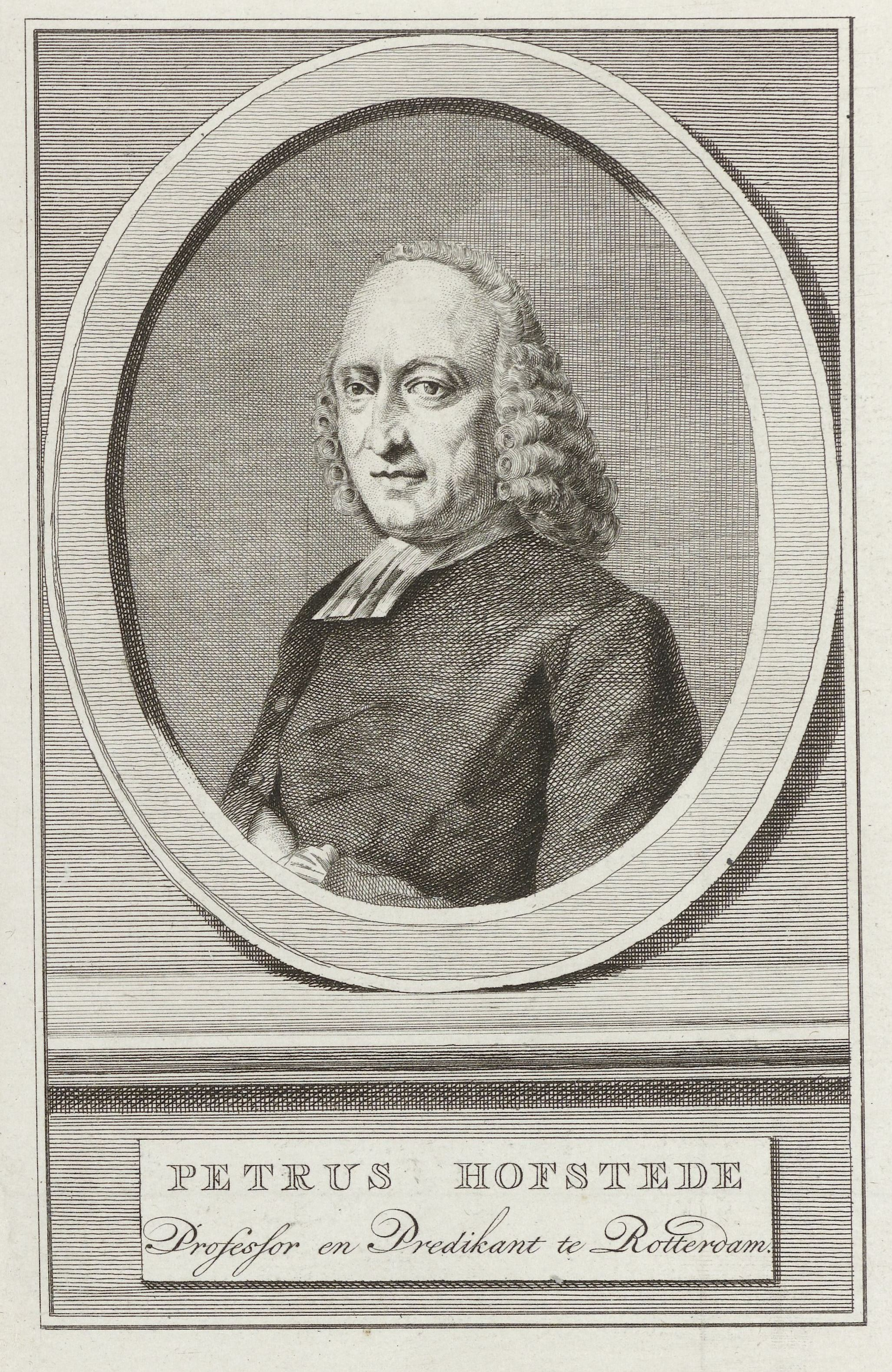 Portret van Petrus Hofstede, 1782. Tekst: Petrus Hofstede/ Professor en Predikant te Rotterdam